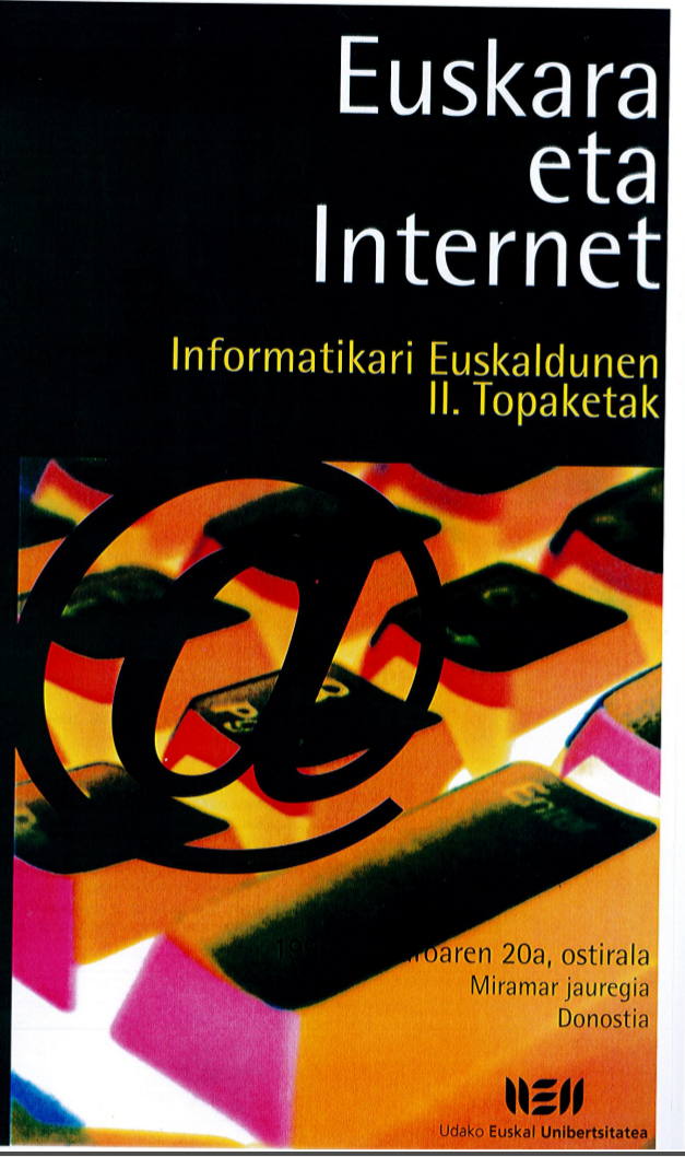 Informatikari Euskaldunen bigarren Bilkurako kartela